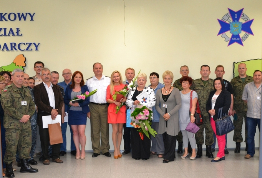 Pożegnanie pracowników z 15 WOG w 2014r.